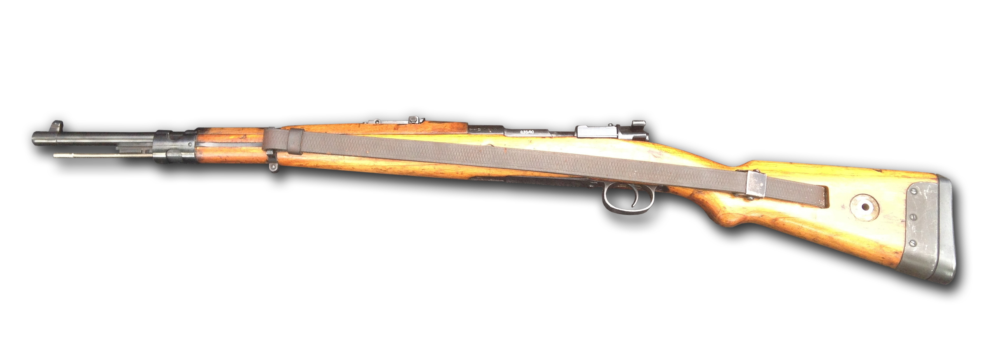 G33/40 Gesamtansicht, linke Seite